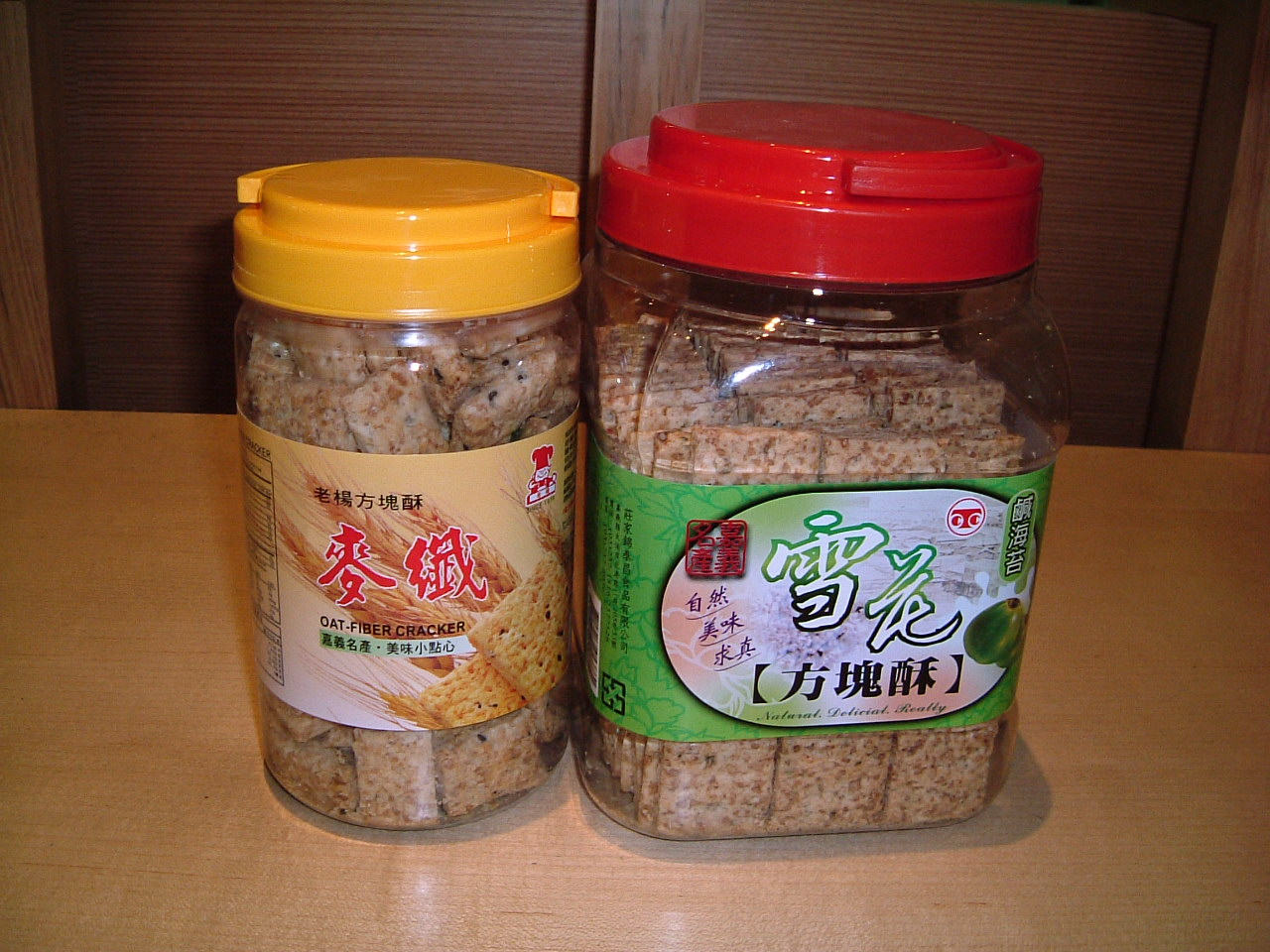 方塊酥，左為「老楊」方塊酥，右為「雪花」方塊酥